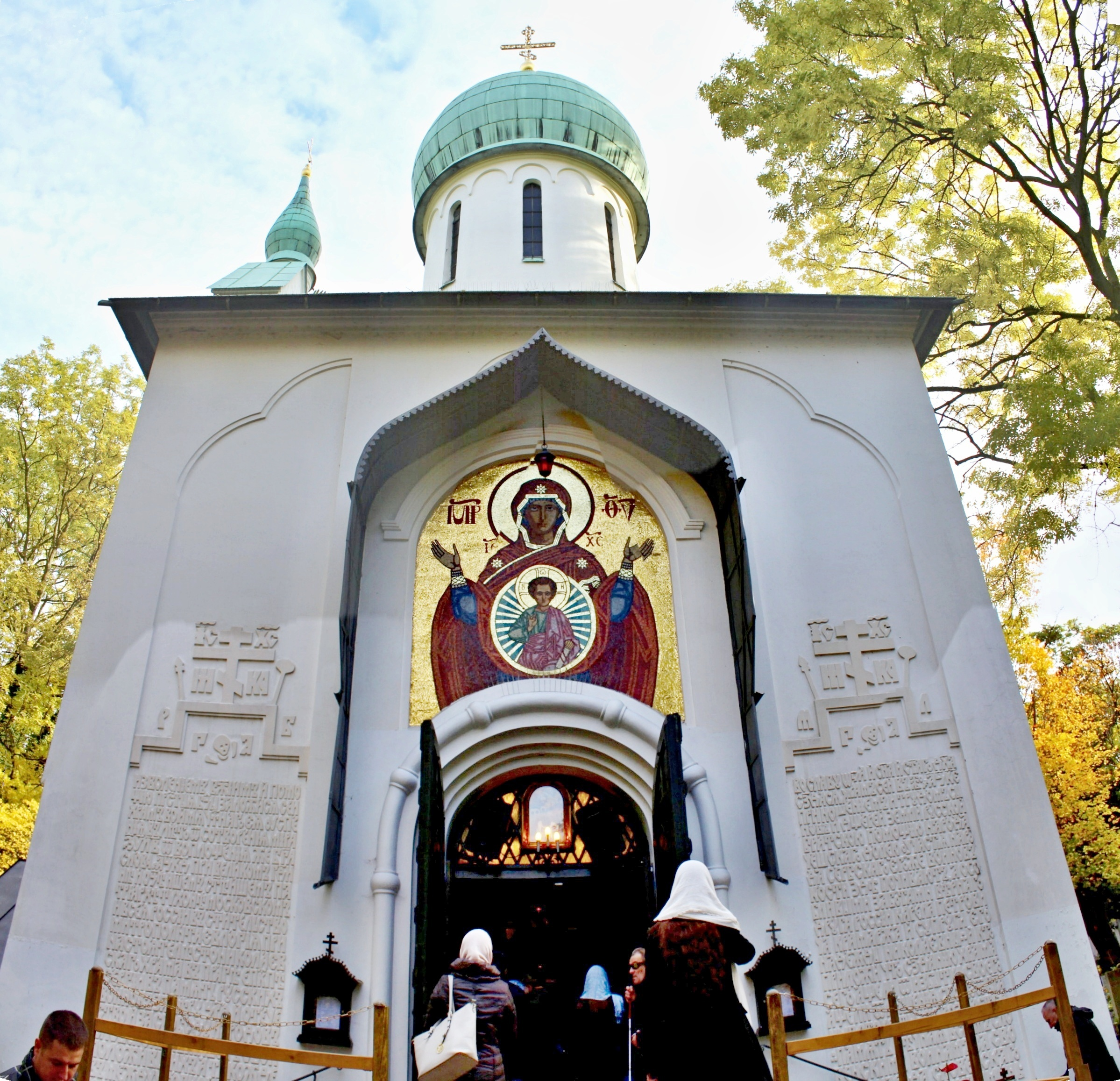 Chrám Zesnutí přesvaté Bohorodice na Olšanech